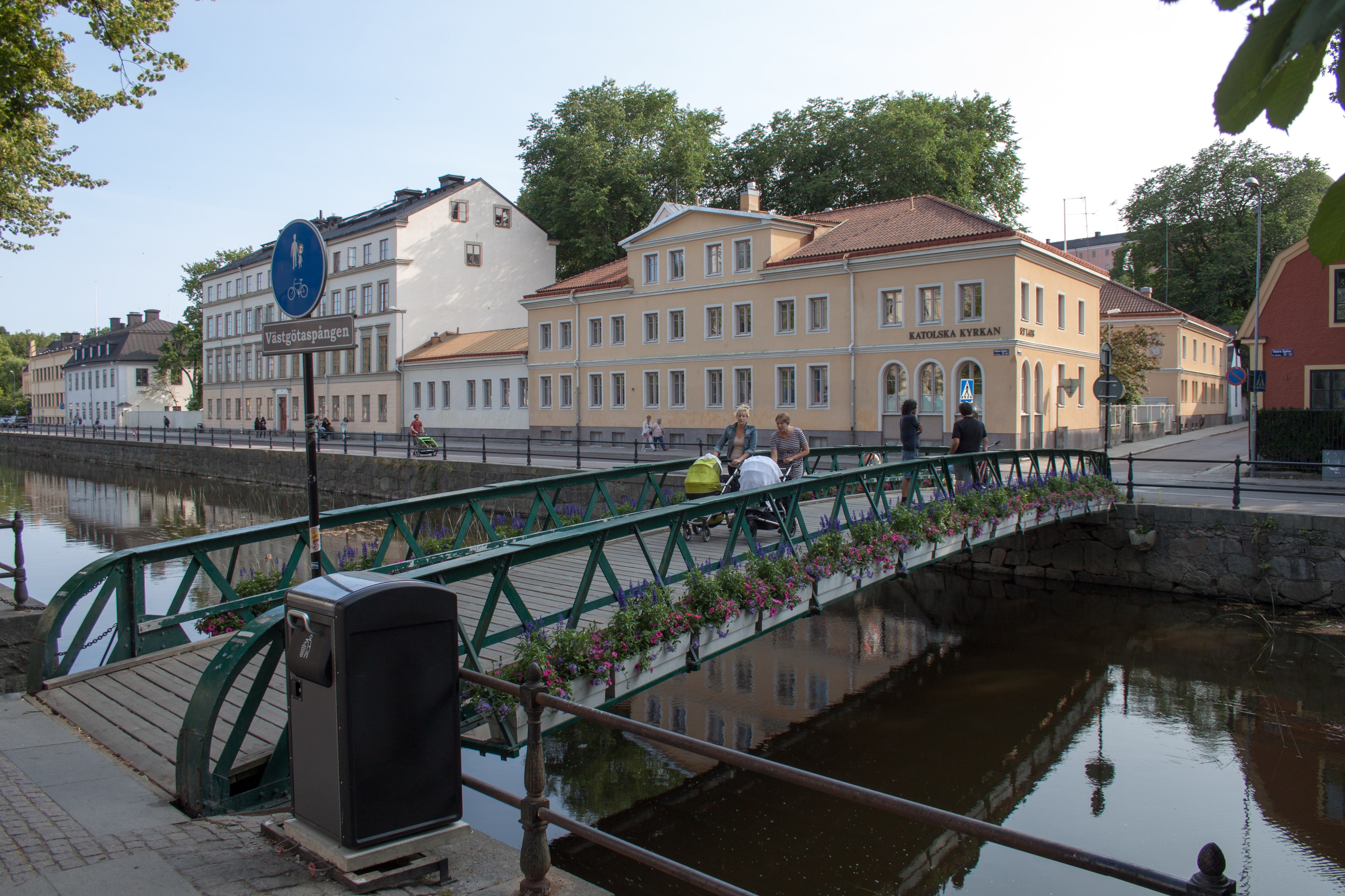 Fyris River in Uppsala